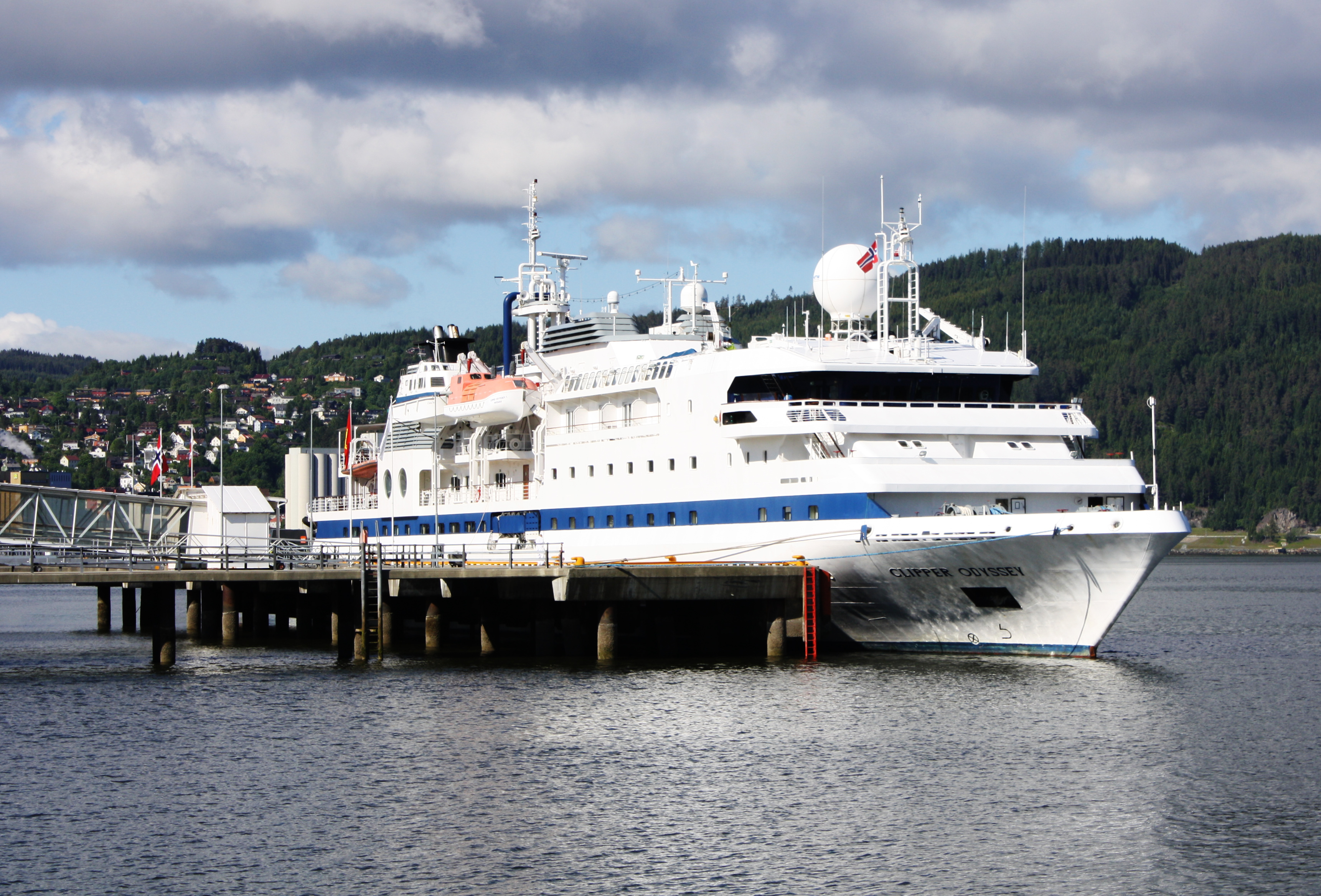 Clipper Odyssey på luksuscruise til Trondheim.